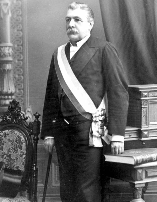 Domingo Santa María (1824 - 1889). Presidente de Chile